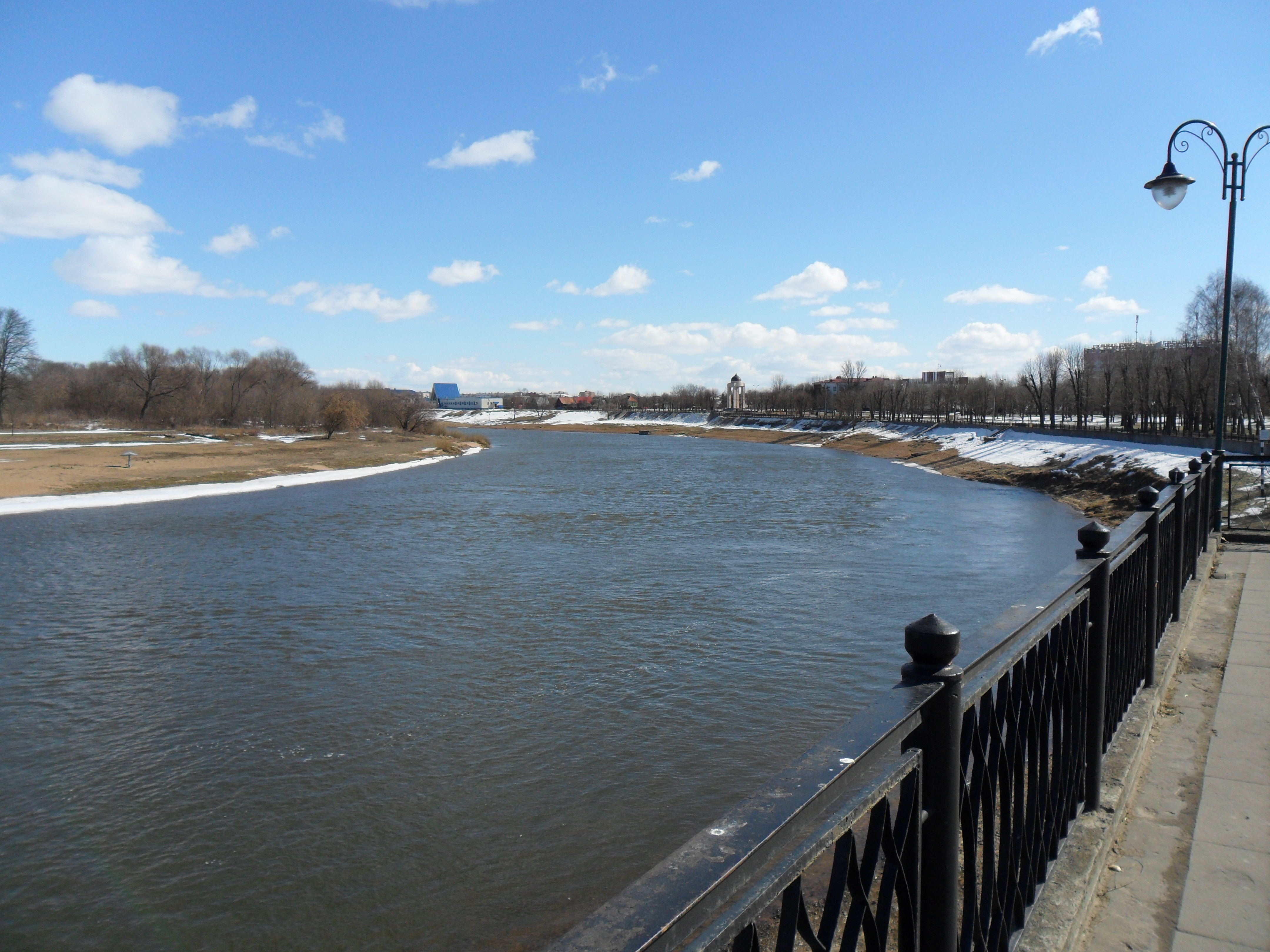 Troicki pasad, Mahilioŭ, Belarus